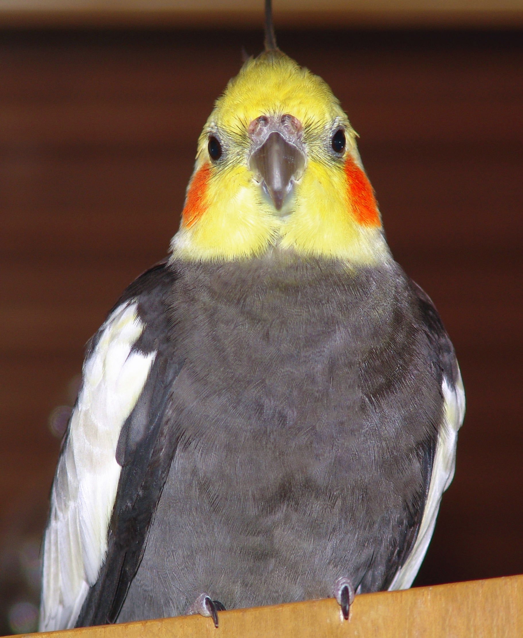 Nymphensittich Miggeli 1